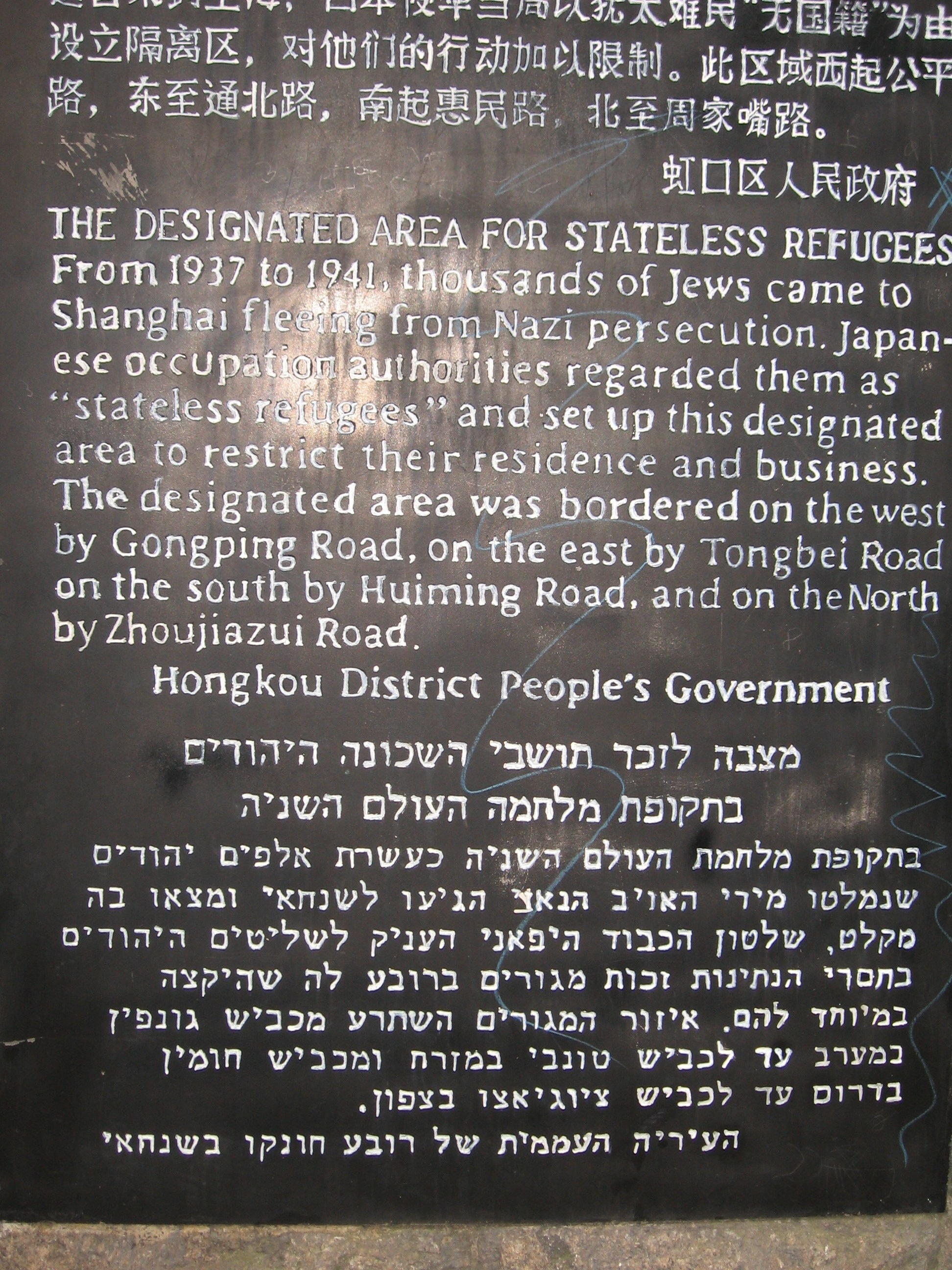 Shanghai ghetto memorial sign